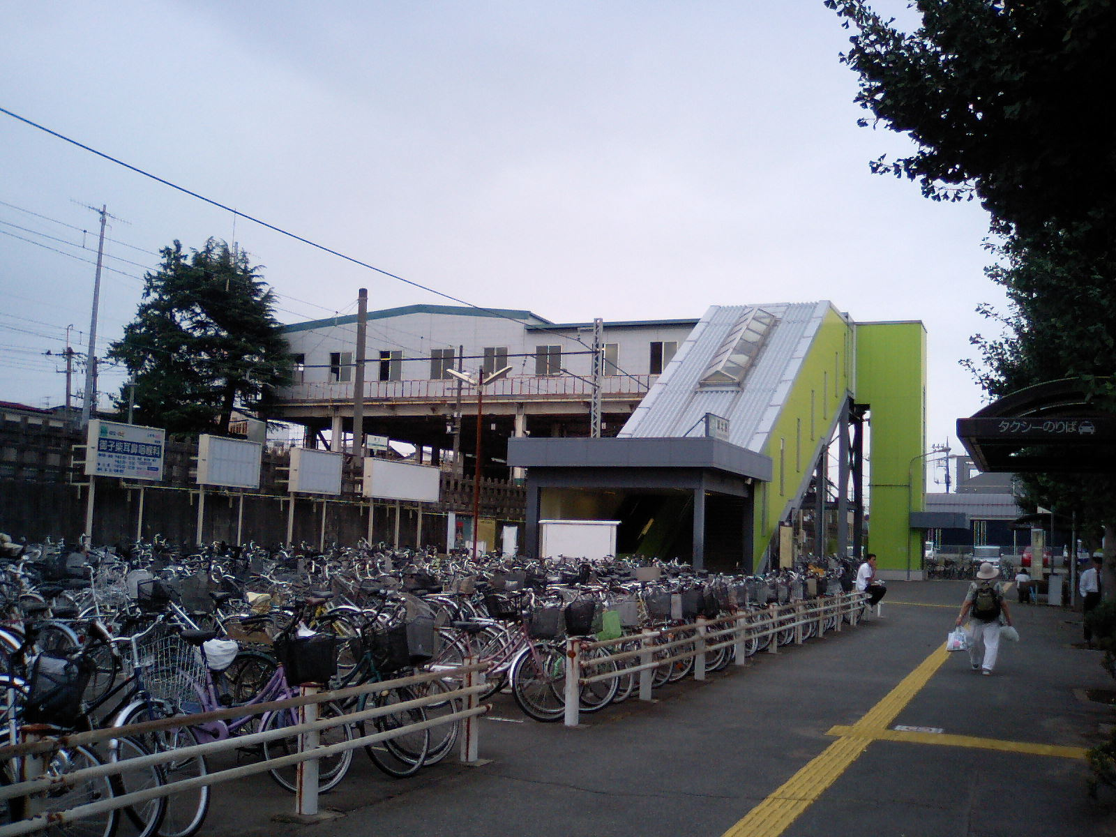 湖北駅南口。